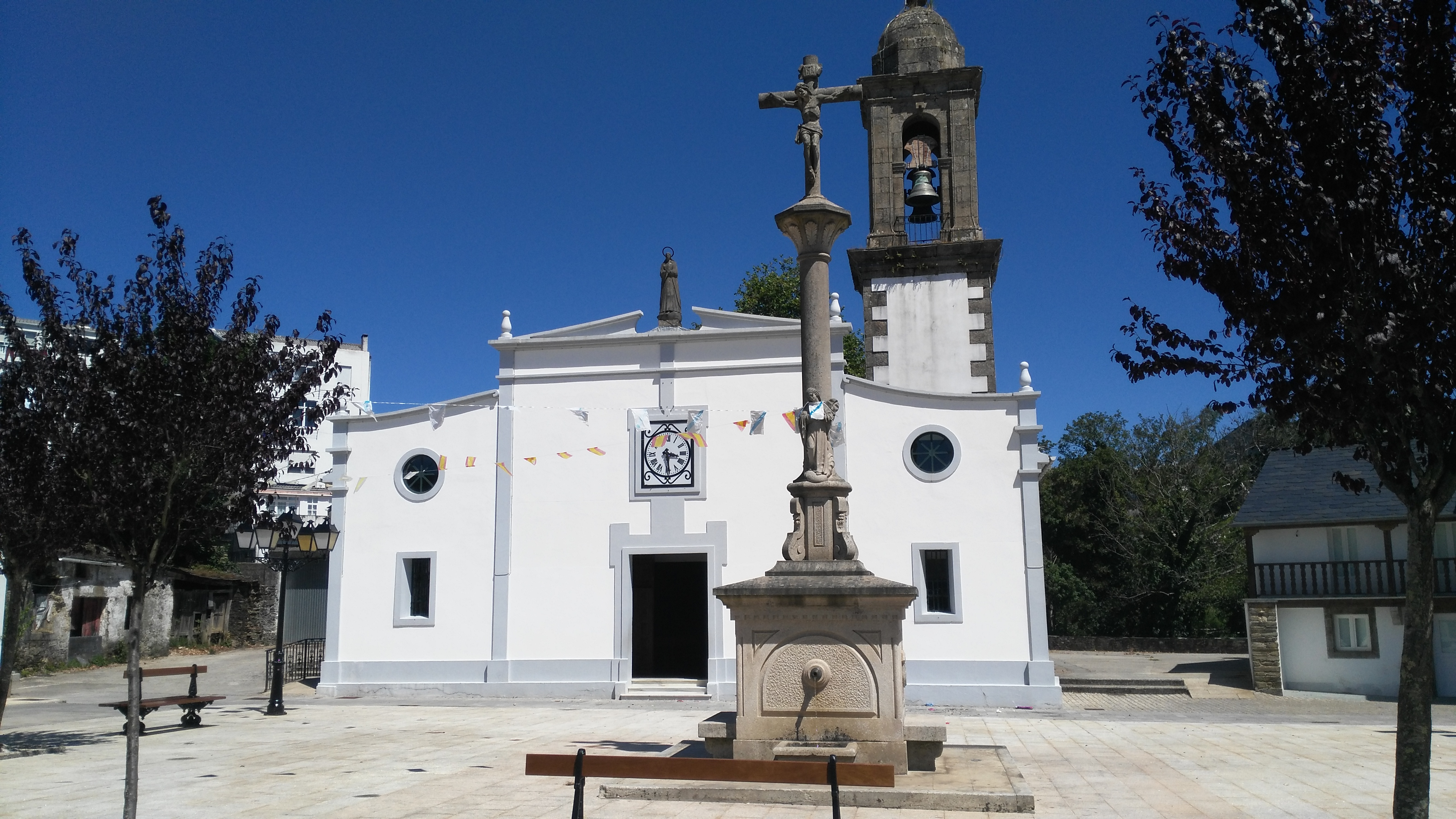 Igrexa parroquial de Santa Maria en As Pontes